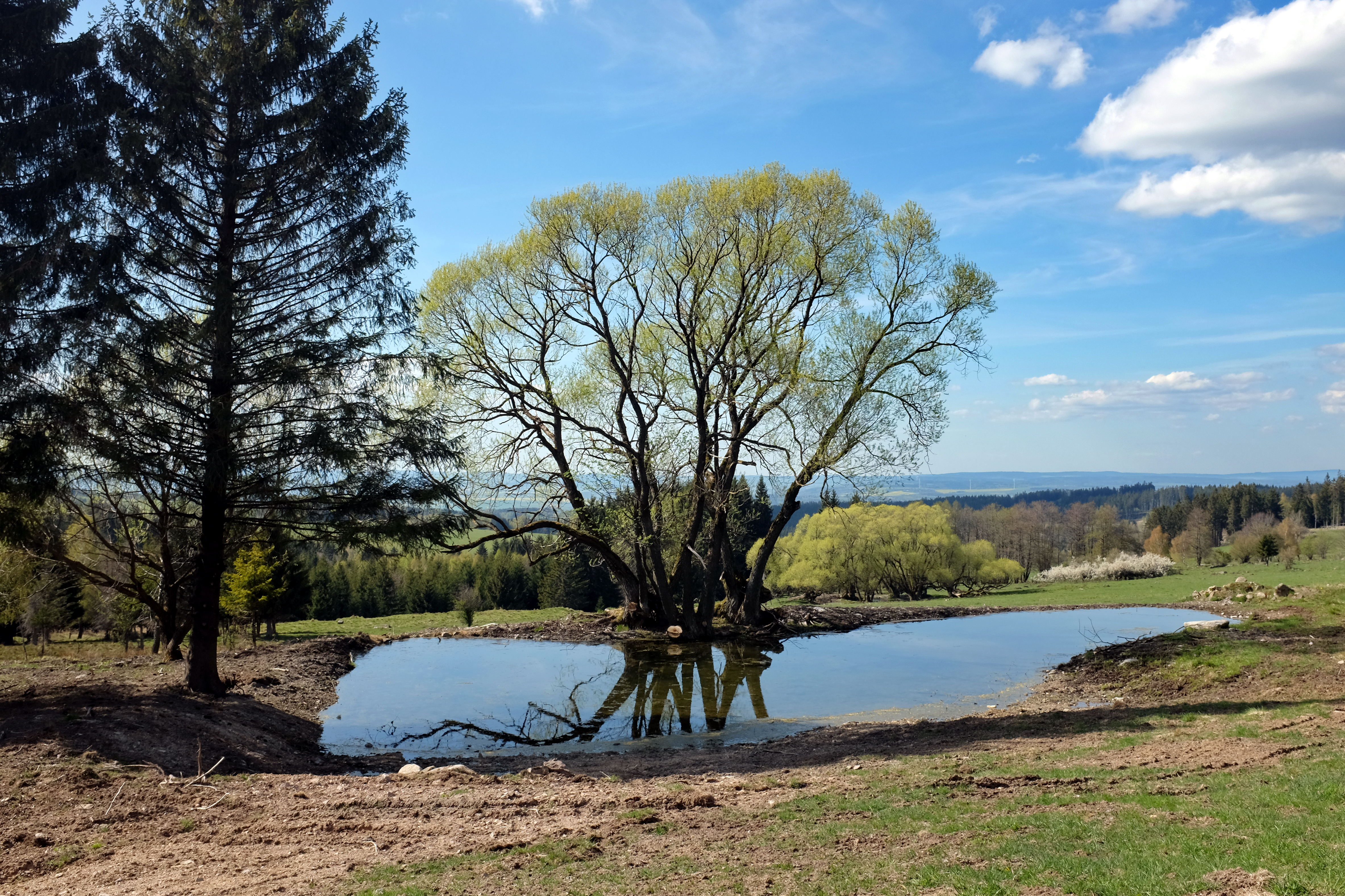 Horní Žitná, zaniklá obec, pastviny, část města Březová, Slavkovský les, okres Sokolov